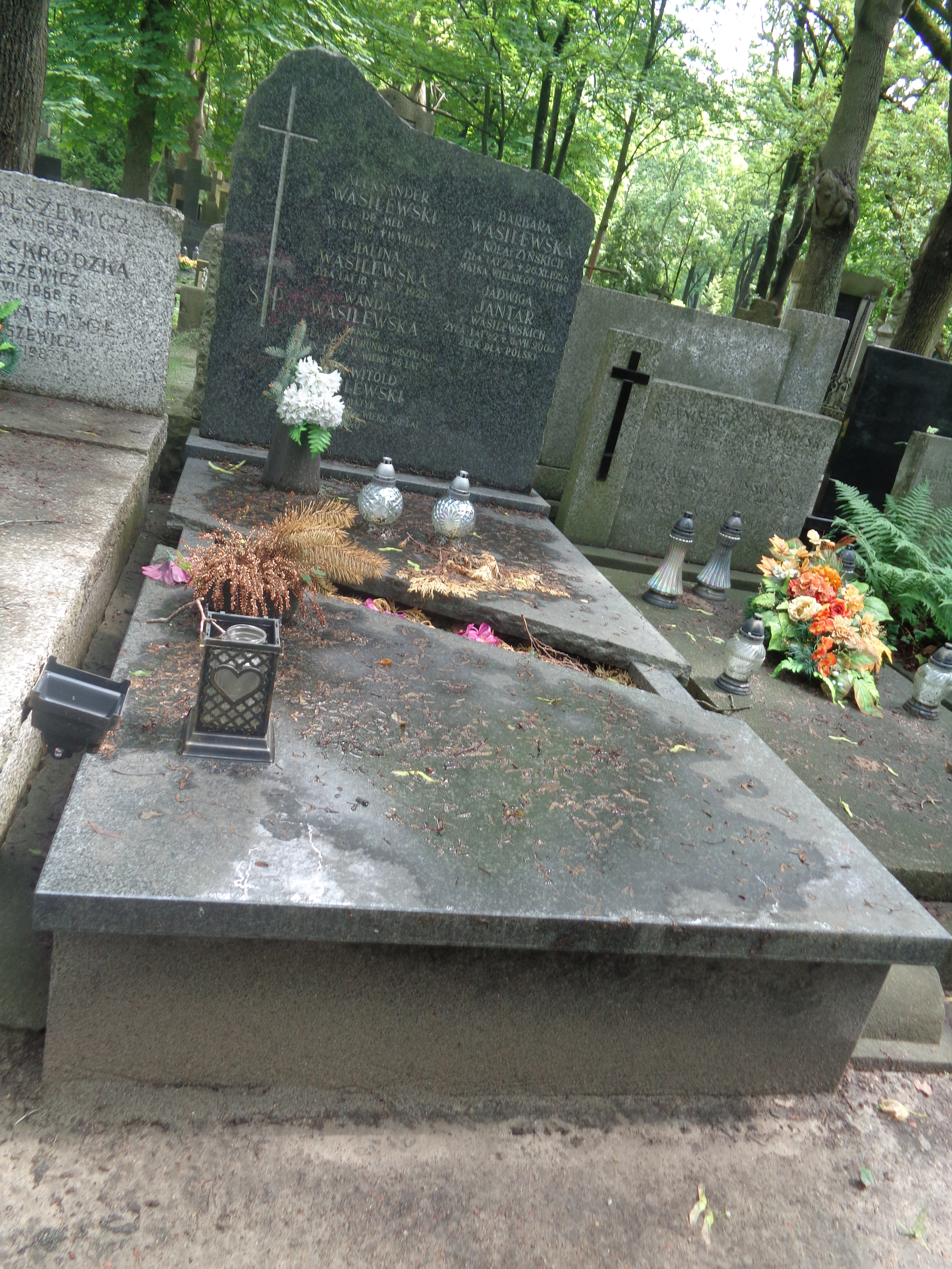 Grób epidemiologa Aleksandra Wasilewskiego na Cmentarzu Powązkowskim